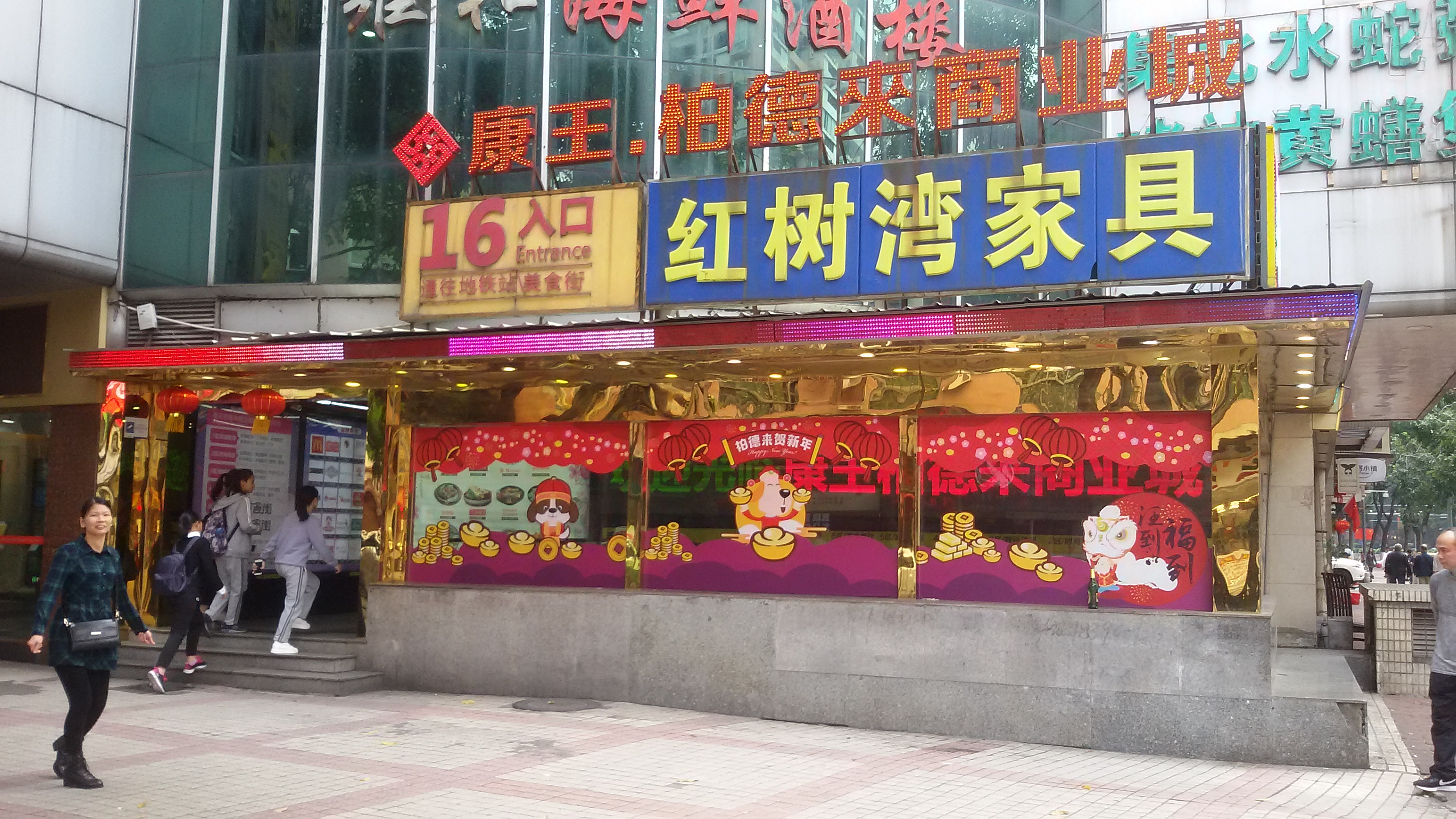 粵語: 康王·柏德來商業城嘅16號出入口